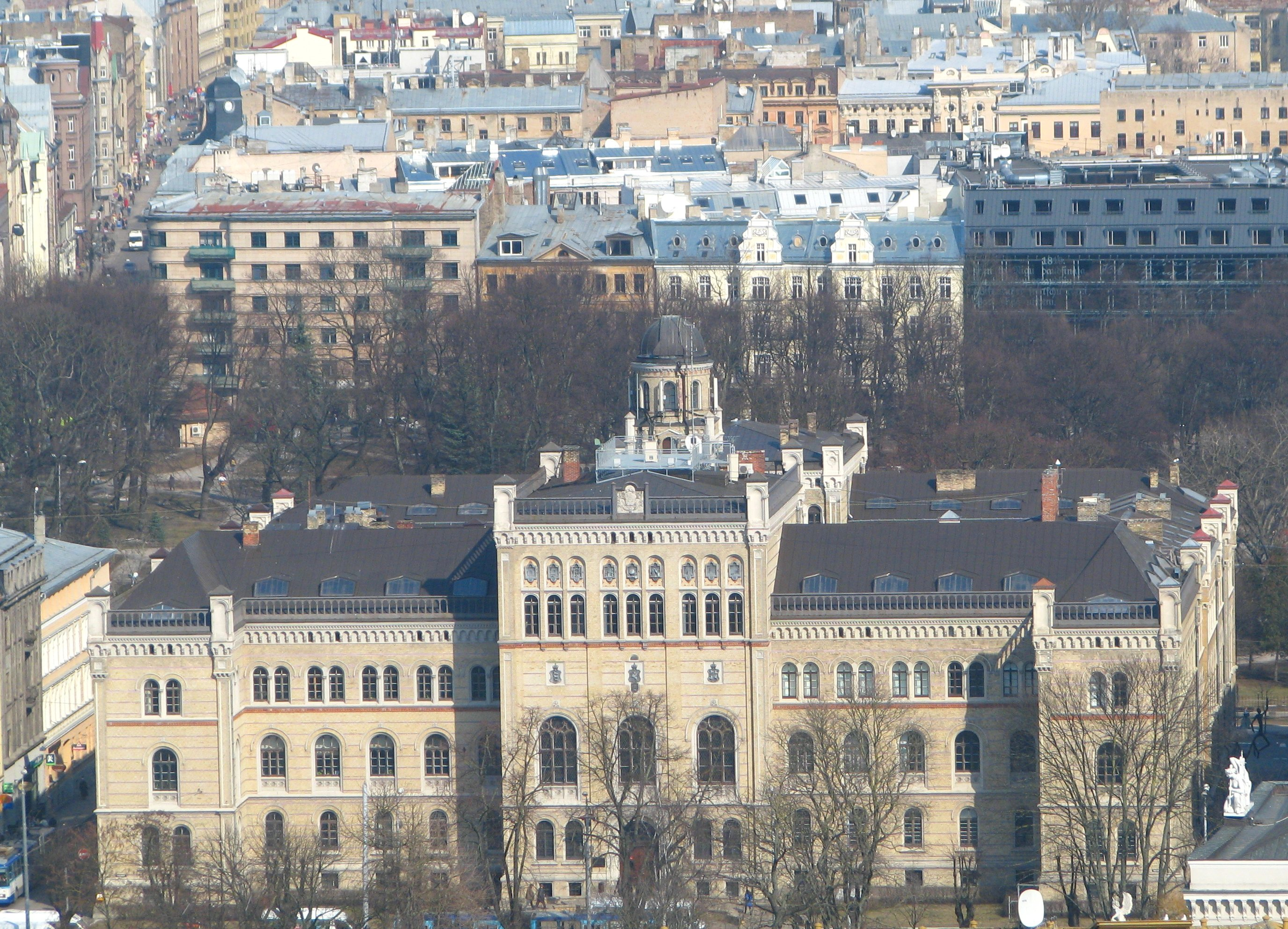 Rīgas Politehniskā institūta galvenā ēka, tagad Latvijas Universitāte, Rīga, Raiņa bulvāris 19